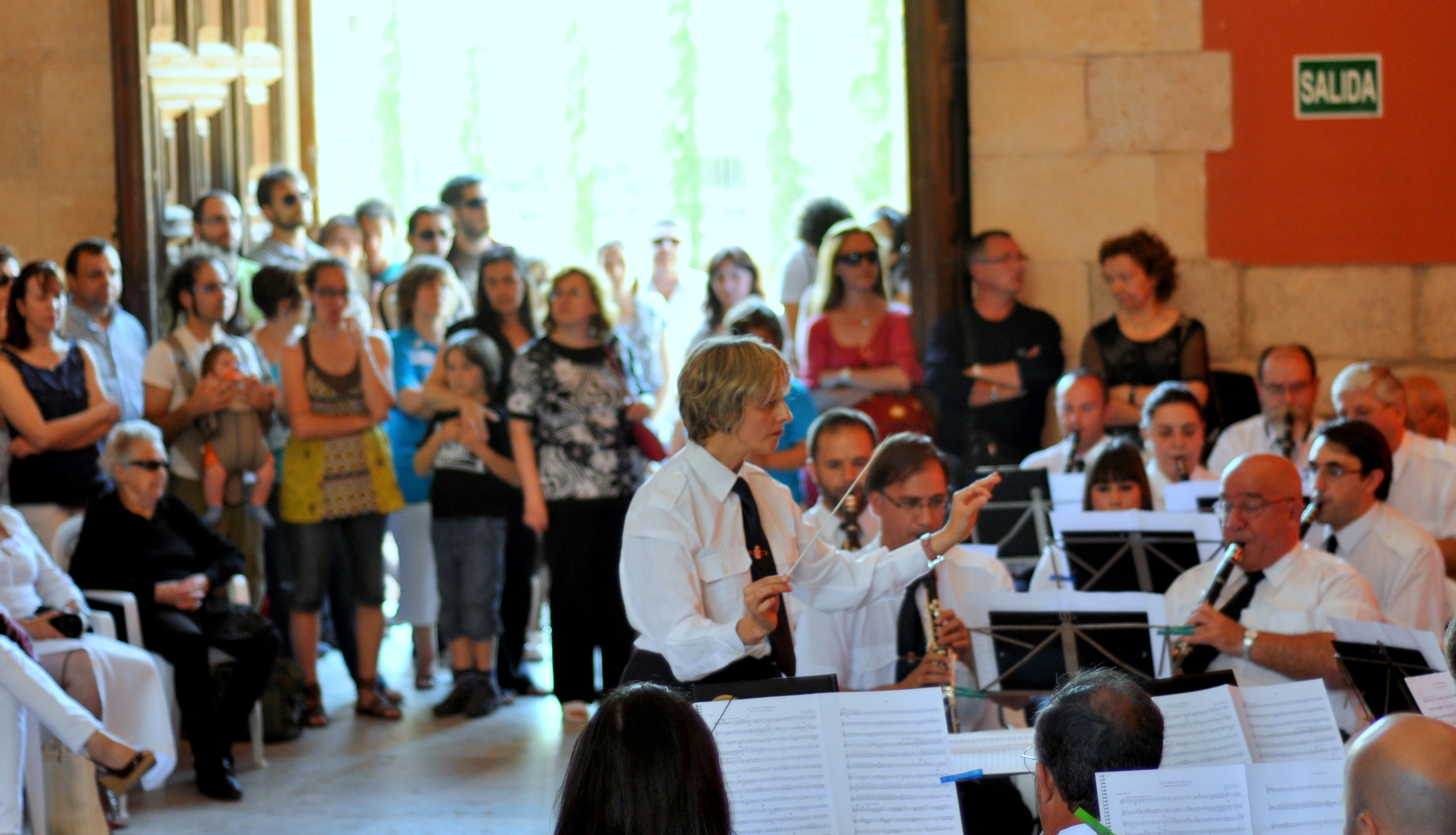 Concierto_fin_maraton_de_los_cuentos_DSC_9170